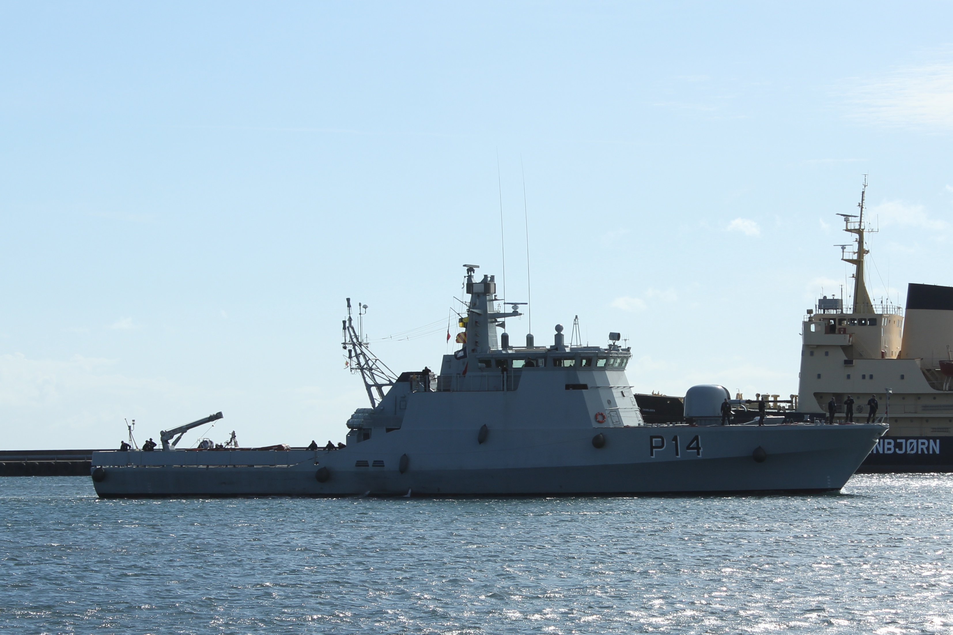 Aukštaitis (P14) ex Lommen (P559). Her under indsejling til Flådestation Frederikshavn